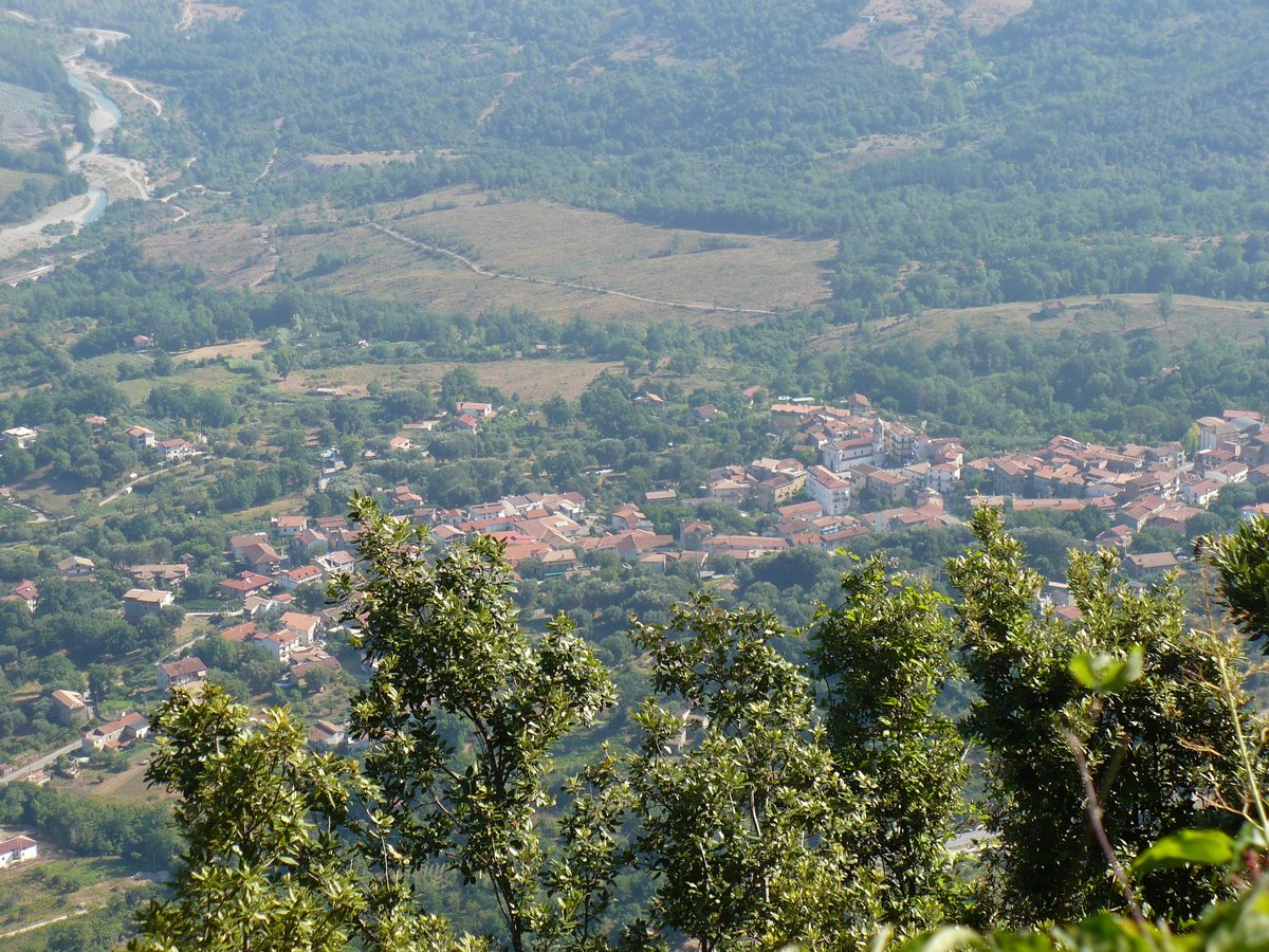 Panorama di Celle di Bulgheria visto dal monte Bulgheria